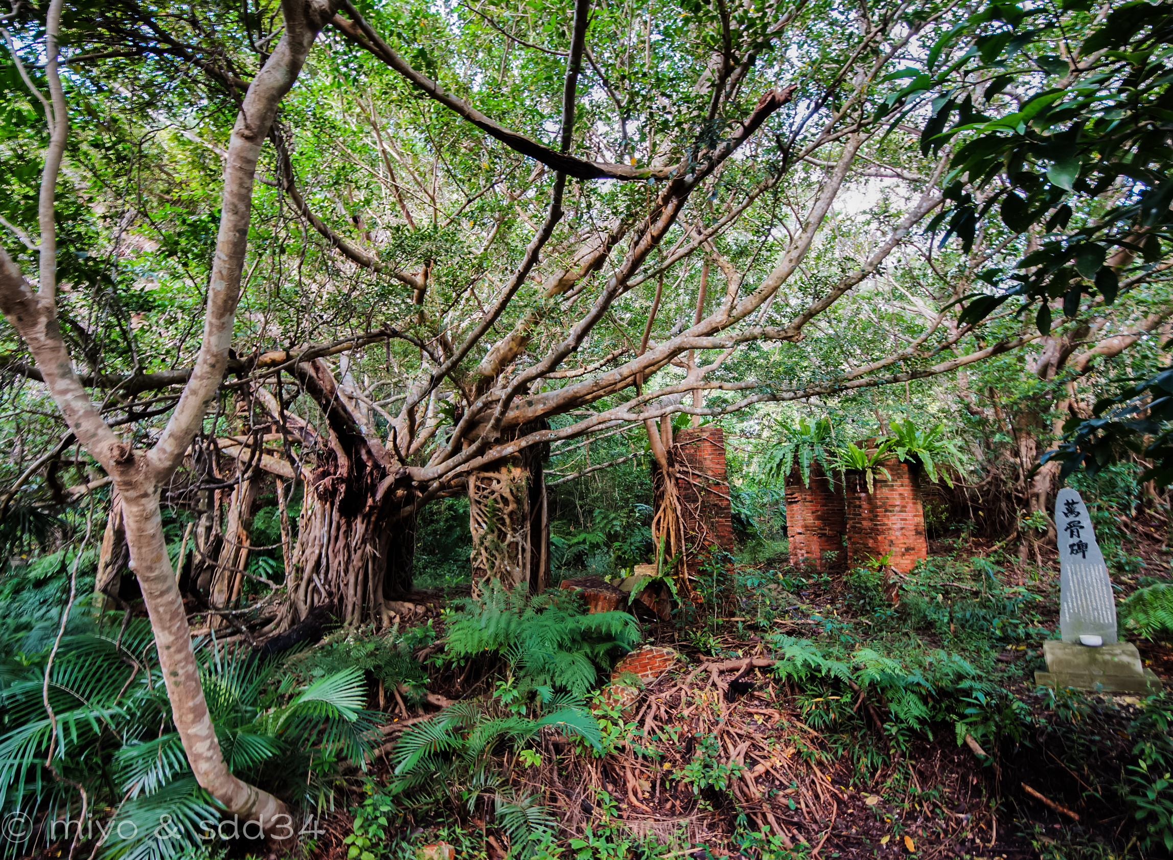 西表島